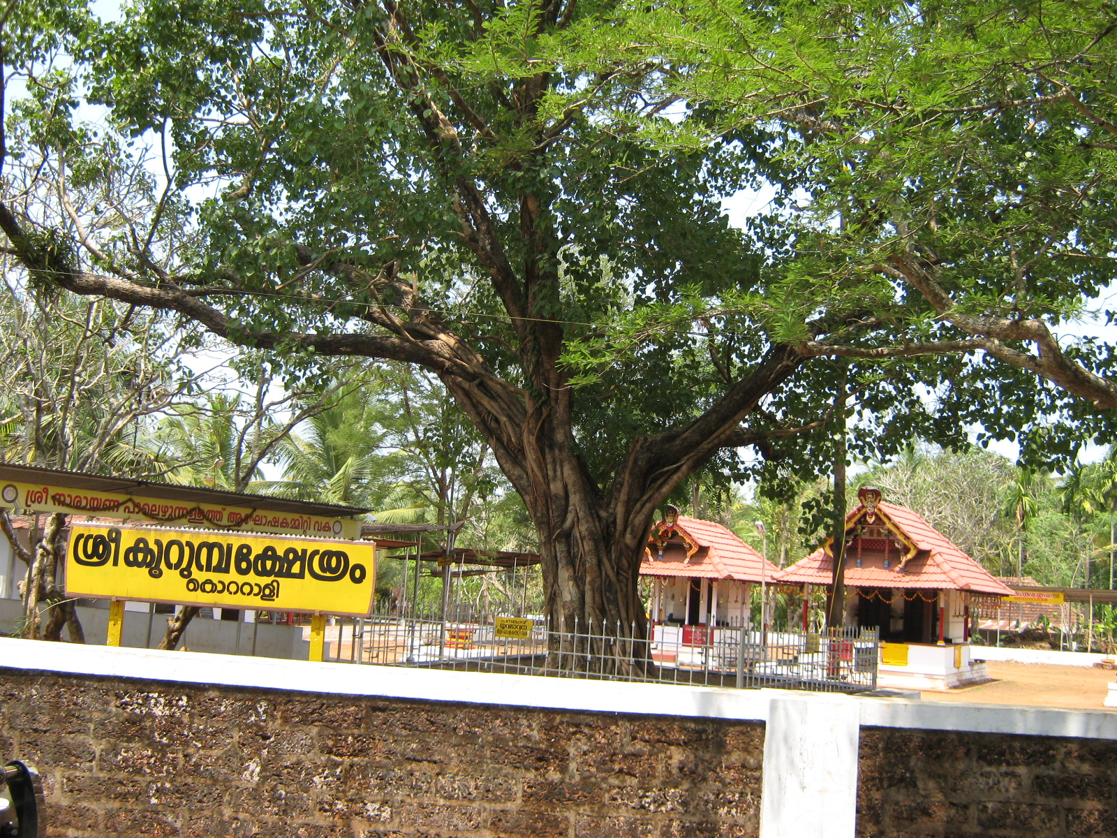 Kannur, Kerala, India.